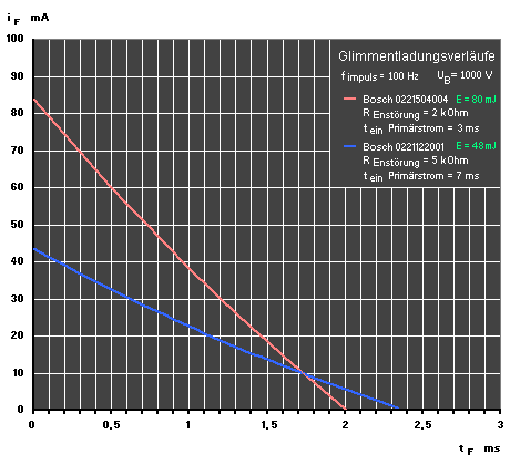 In Anlehnung an ISO 6518 ermittelte Glimmententladungsströme von zwei Transistorzündspulen, wobei die vom Fahrzeughersteller hochspannungsseitig eingesetzten Entstörwiderstände hier mitberücksichtigt wurden. Die Zündfunkenenergien werden durch die jeweiligen Flächenanteile unter den Stromkurven repräsentiert.